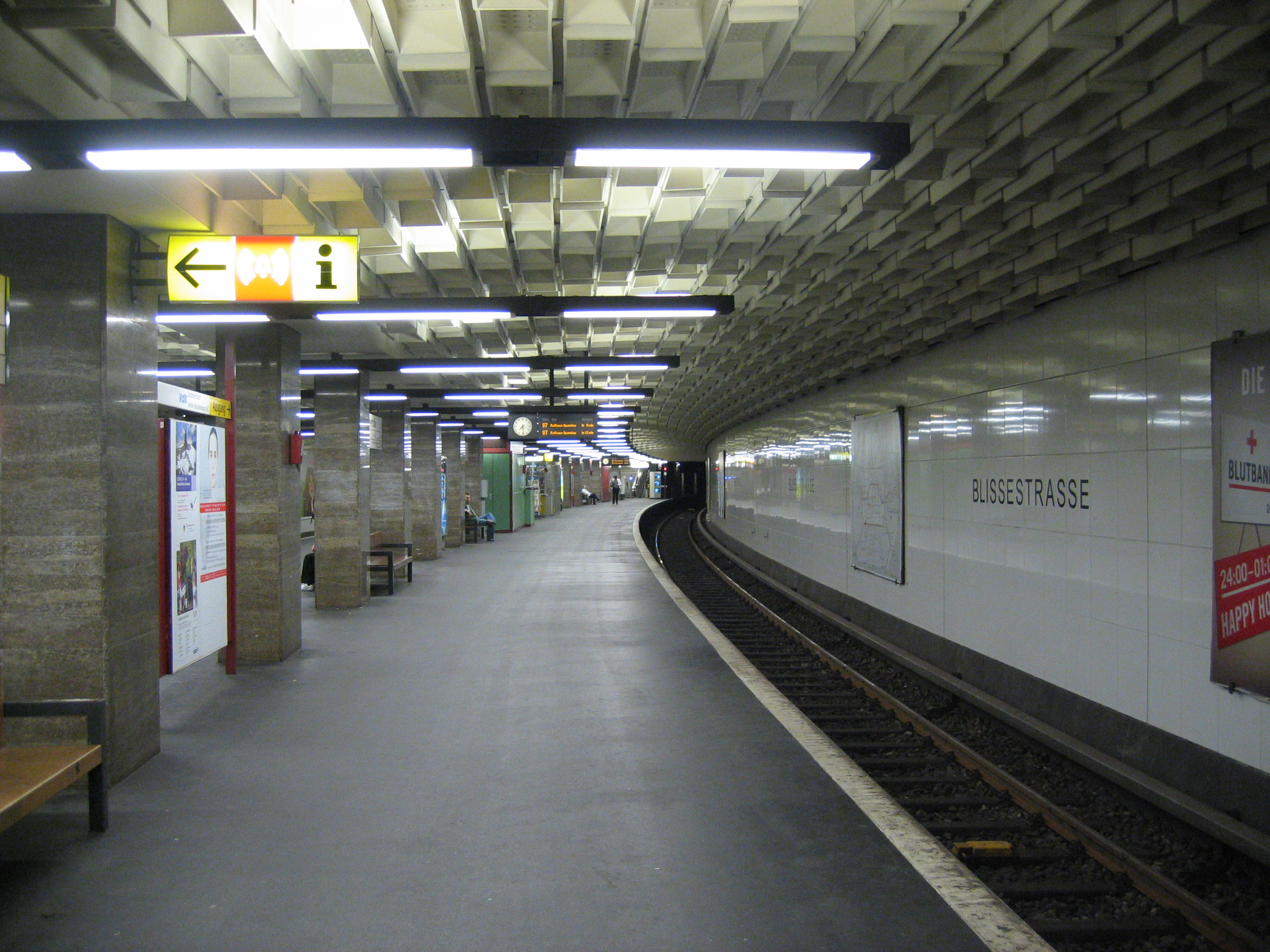 U-Bahnhof Blissestraße, Berlin